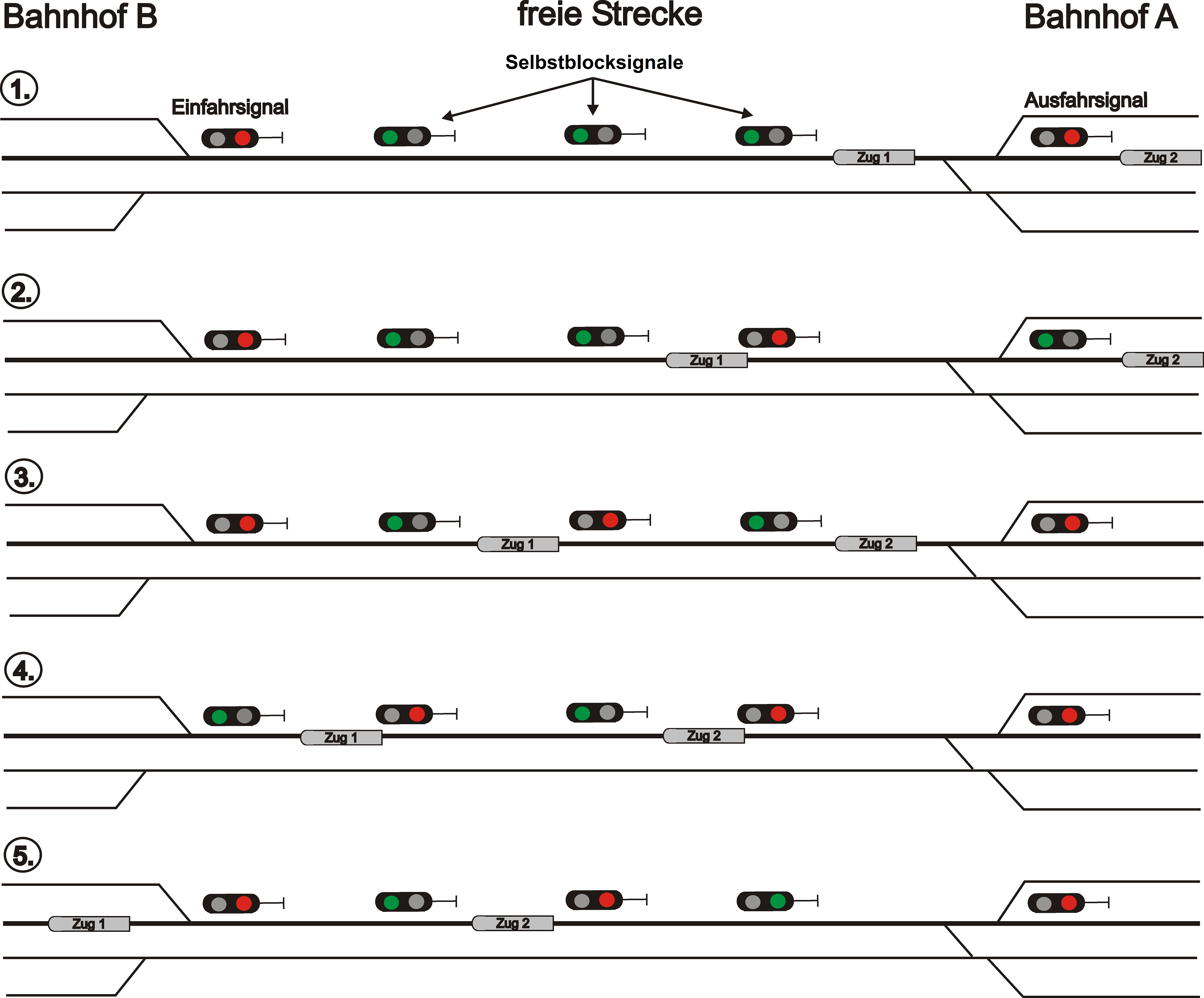 Schematische Darstellung der Funktion des selbsttätigen Streckenblocks